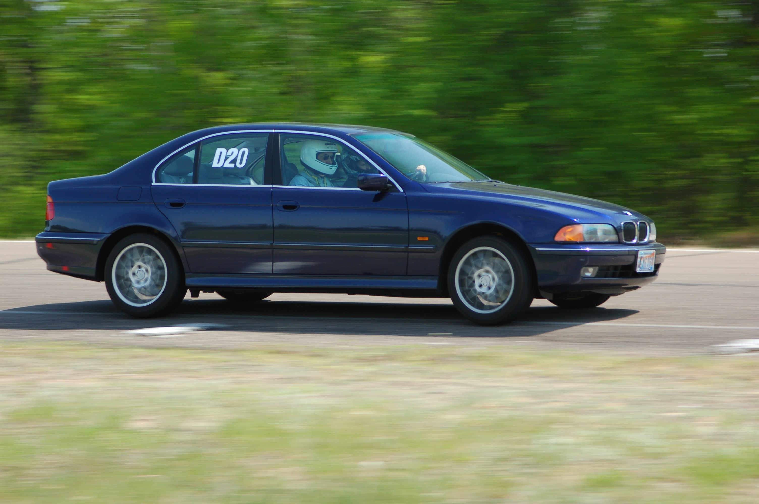 BMW E39